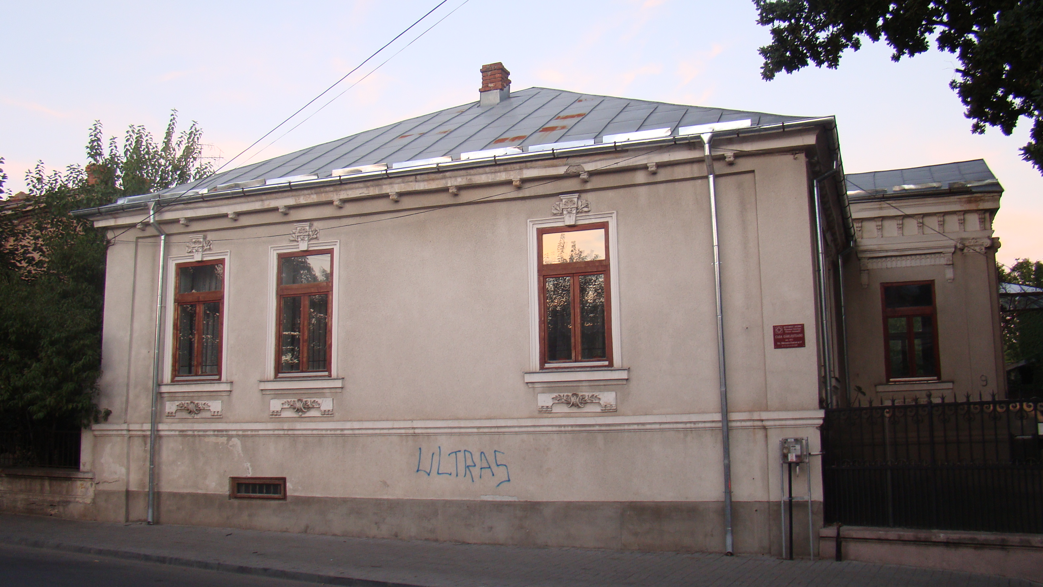 Casa Gârleșteanu